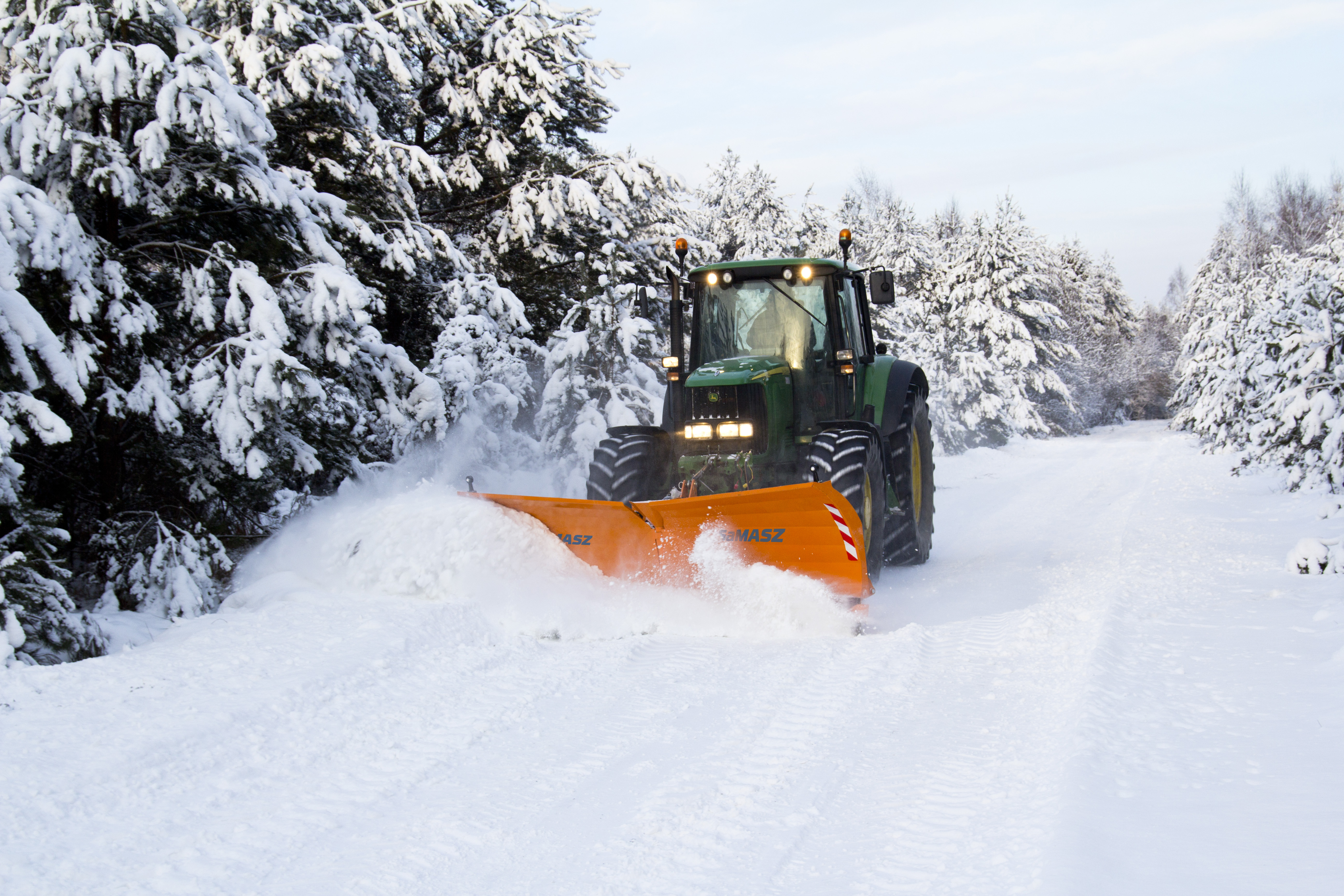 Pług odśnieżny SaMASZ AlpS 330 o szerokości roboczej 3,3m